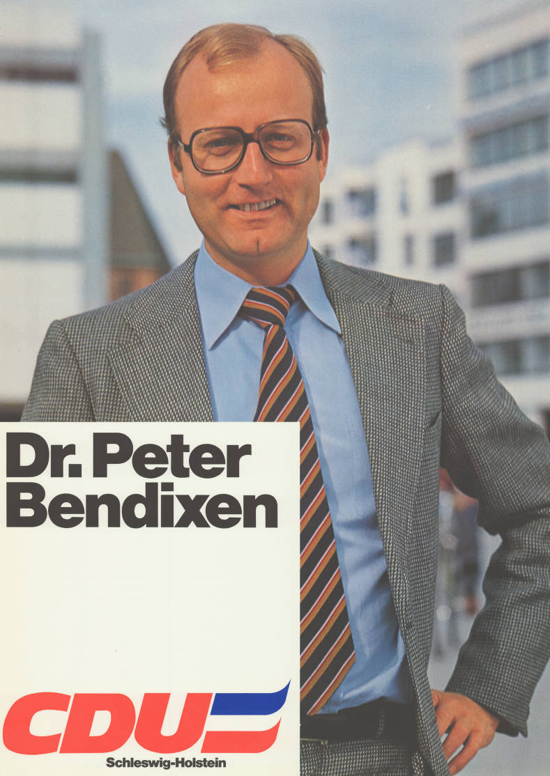 Dr. Peter Bendixen CDU Schleswig-Holstein Abbildung: Foto Plakatart: Kandidaten-/Personenplakat mit Porträt Auftraggeber: Verantw.: CDU Schleswig-Holstein Objekt-Signatur: 10-012 : 414 Bestand: Landtagswahlplakate Schleswig-Holstein (10-012) GliederungBestand10-18: Landtagswahlplakate Schleswig-Holstein (10-012) » Landtagswahl am 29.4.1979 » Ankündigungsplakate Lizenz: KAS/ACDP 10-012 : 414 CC-BY-SA 3.0 DE